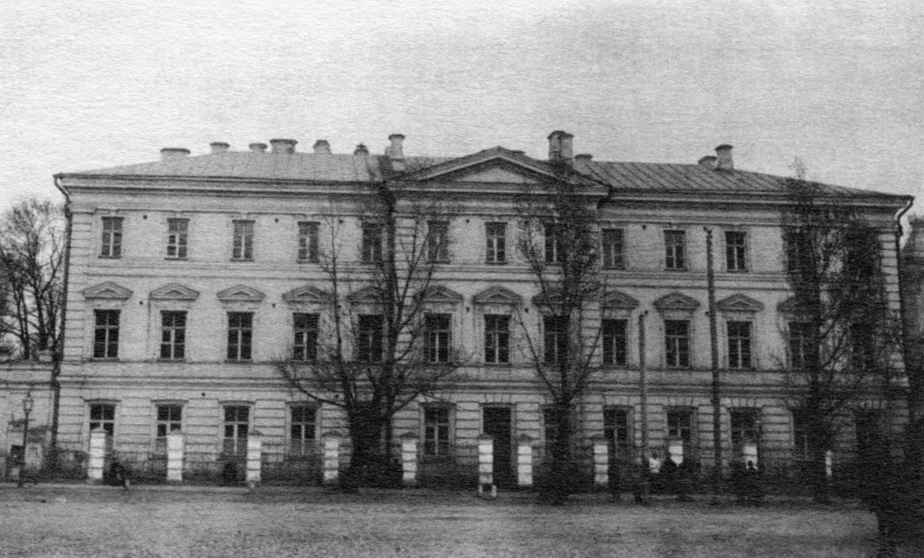 Будівля Київської духовної академії